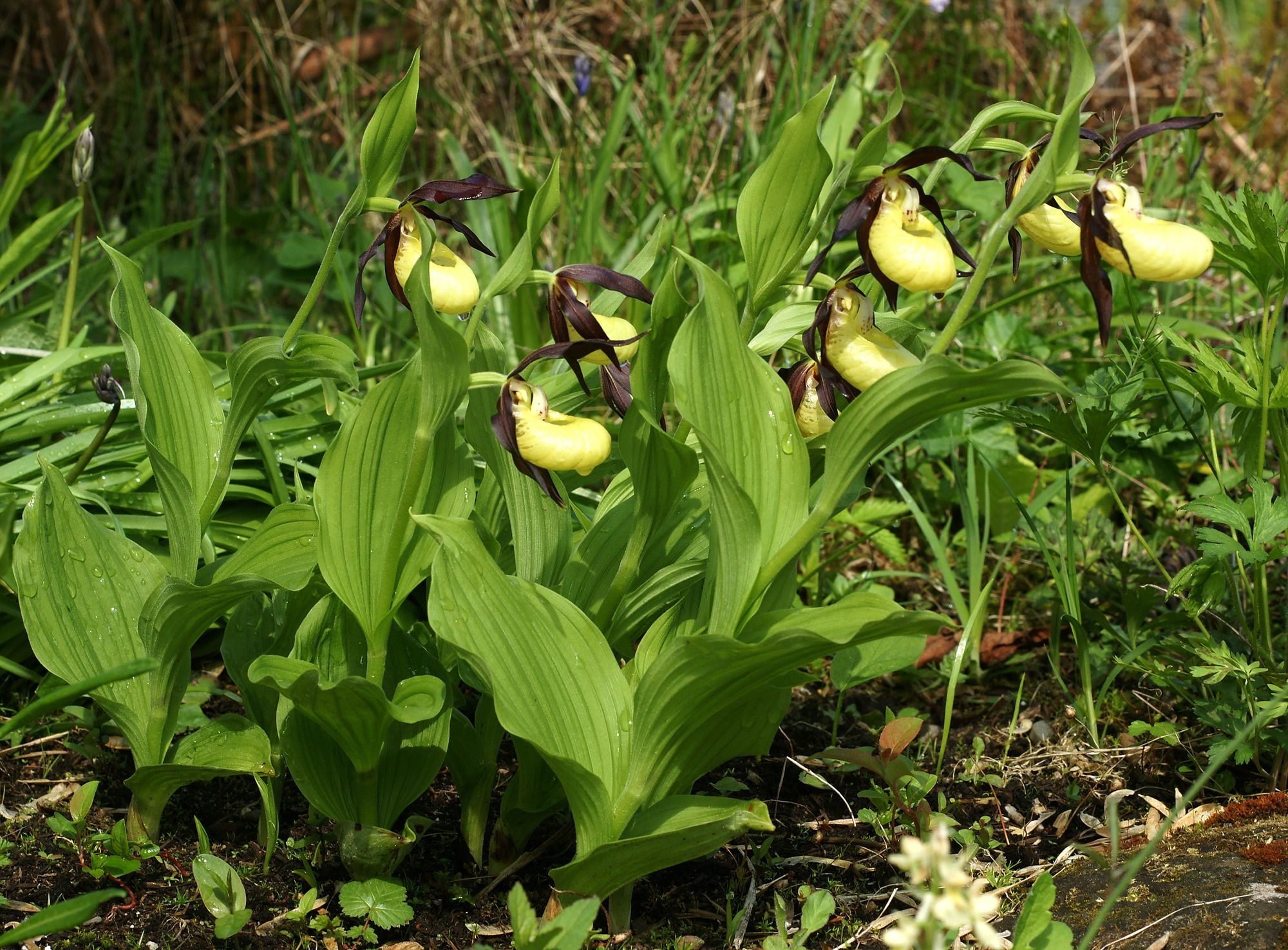 Cypripedium calceolus